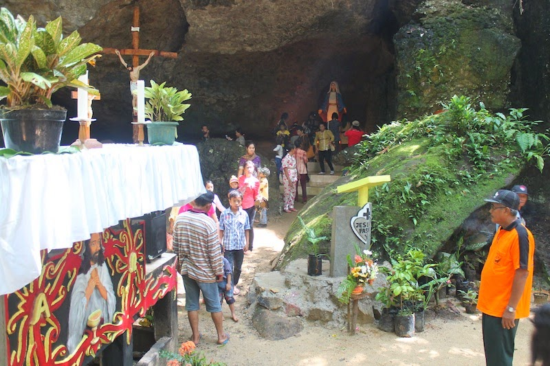 Gua Maria di lihat dari samping